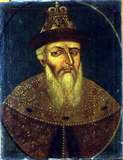 Парсуна Ивана Грозного/ Нижний Тагил